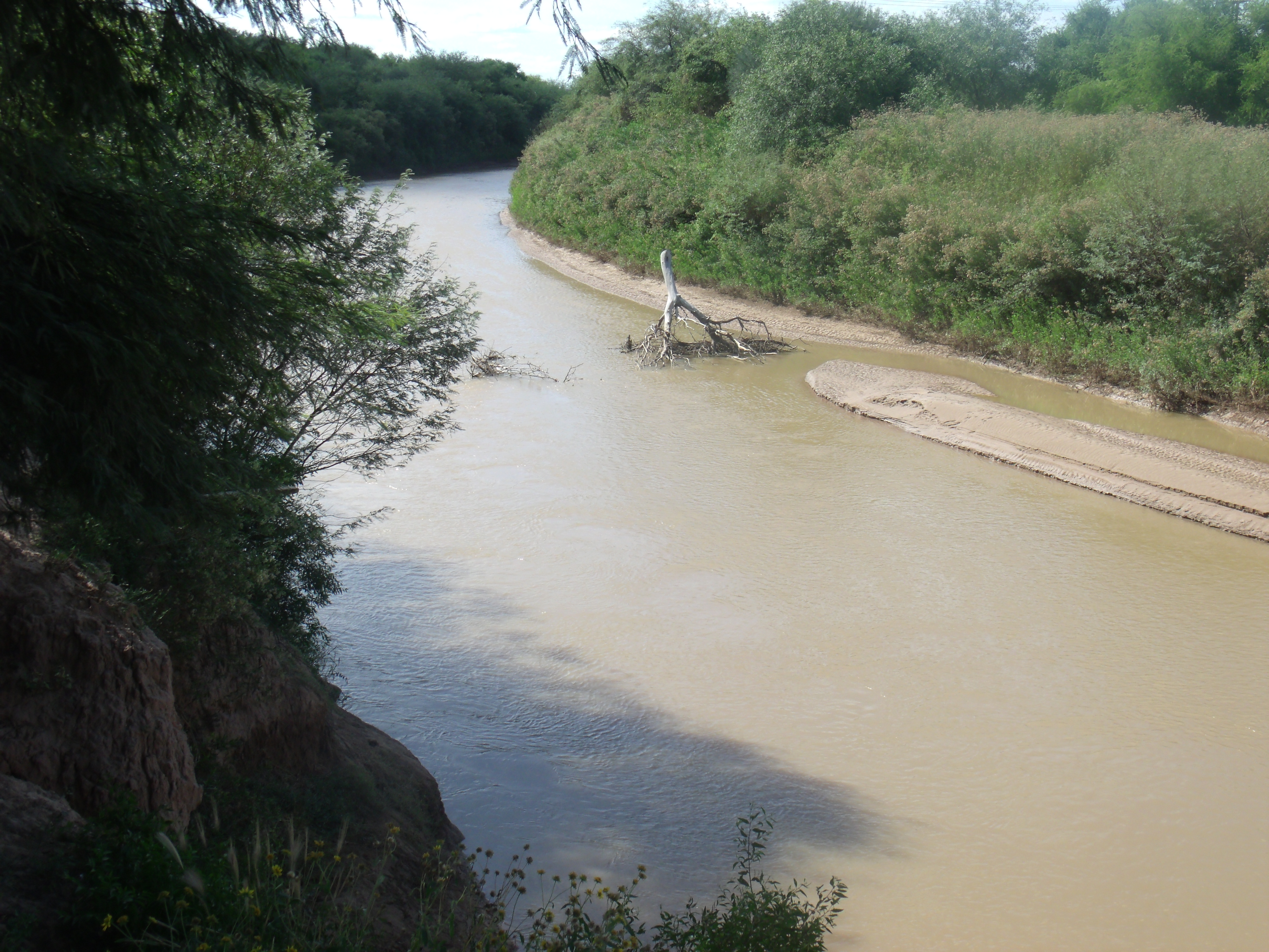 El río Salado del Norte desde la barranca junto al puente en Suncho Corral hacia el Norte